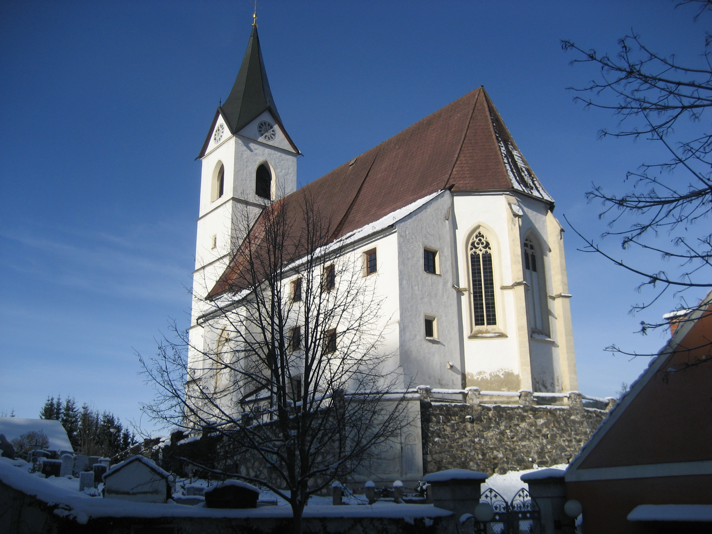 Kath. Pfarrkirche hl. Jakobus d. Ä. mit Friedhof, davor an der Mauer das Kriegerdenkmal.